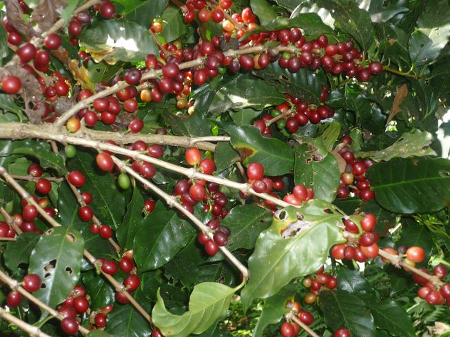 Cafe de Gualupe Nuevo Centro